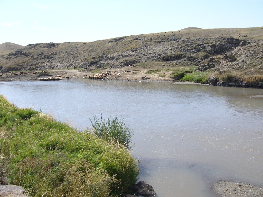 Une rivière dans la région de Shirak en Arménie